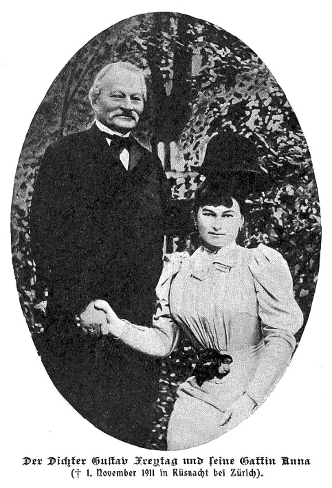 Gustav Freytag (1816–1895) Schriftsteller und Anna Strakosch, geb. Götzel in Küsnacht, Schweiz.(1911)